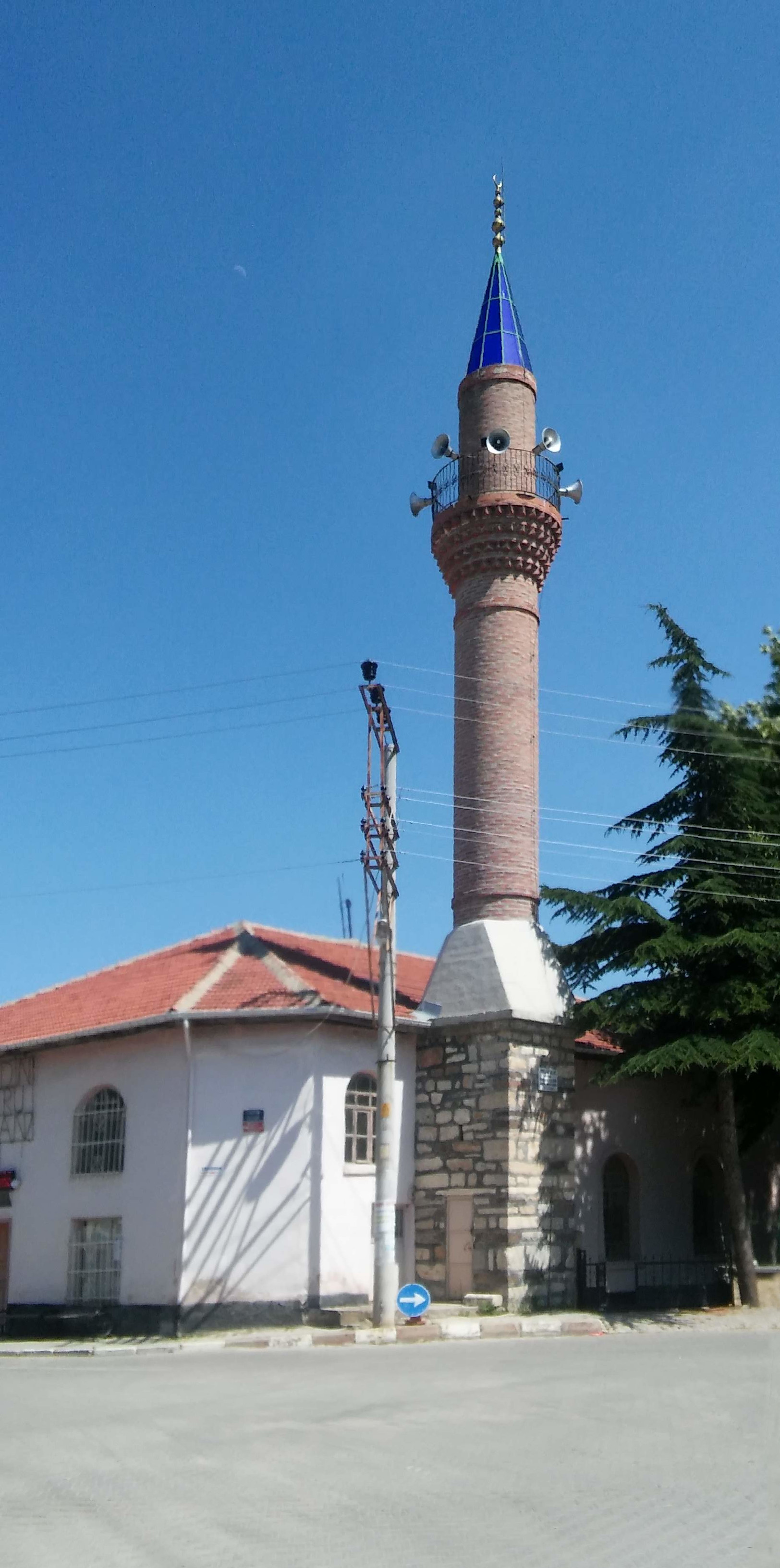 Kethüda Ahmet Ağa Cami